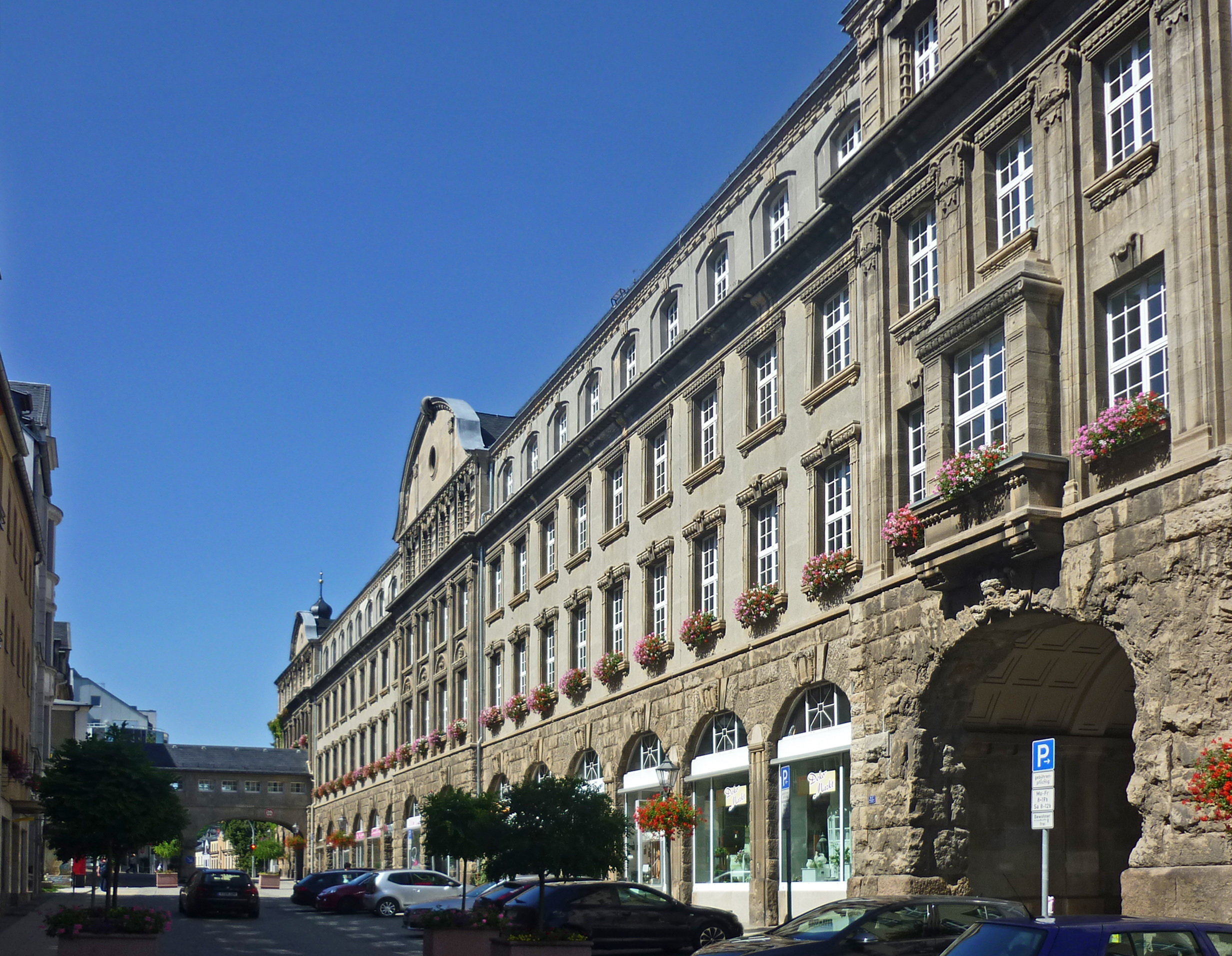 Neues Rathaus in Plauen